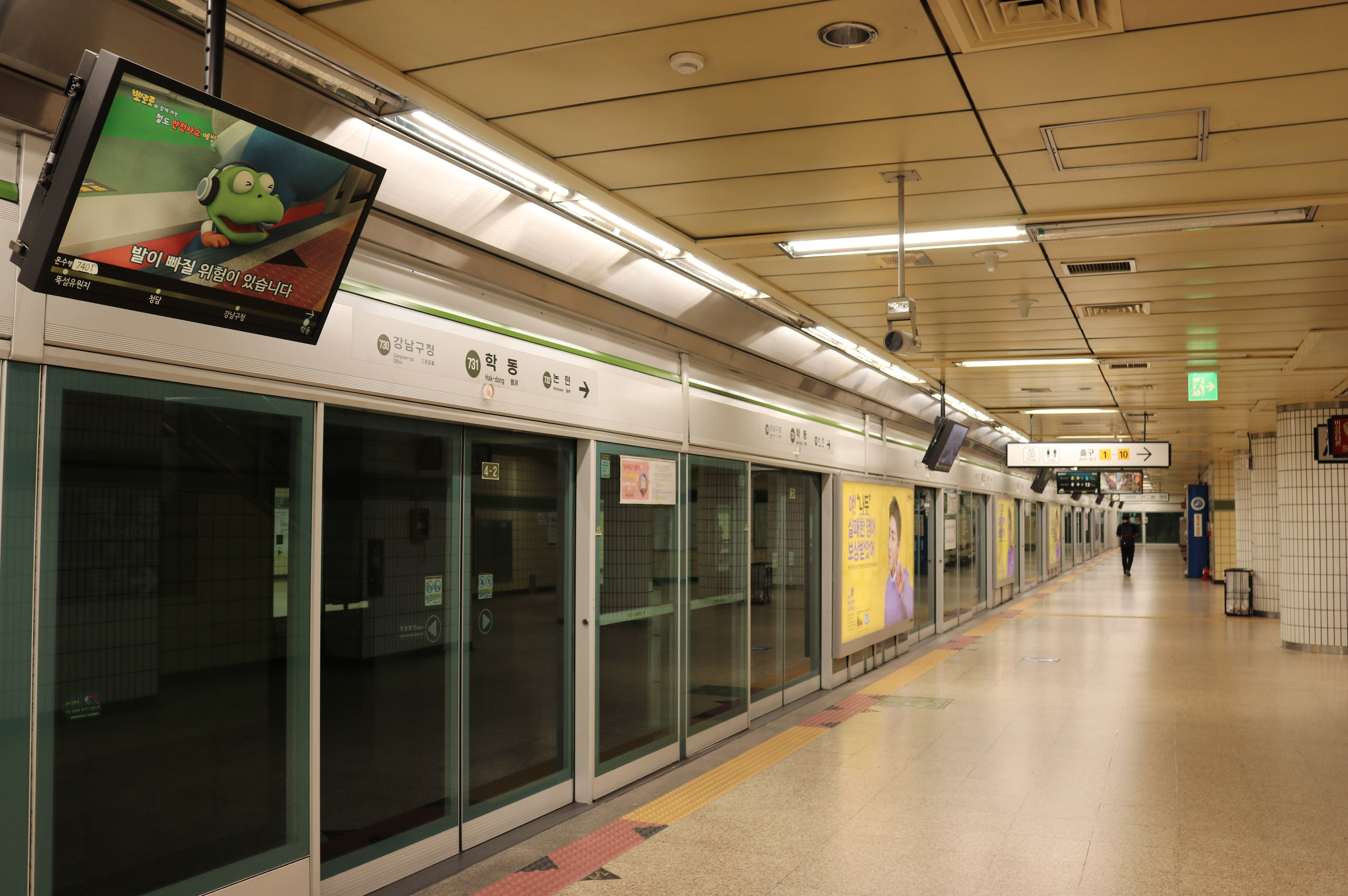 학동역 승강장